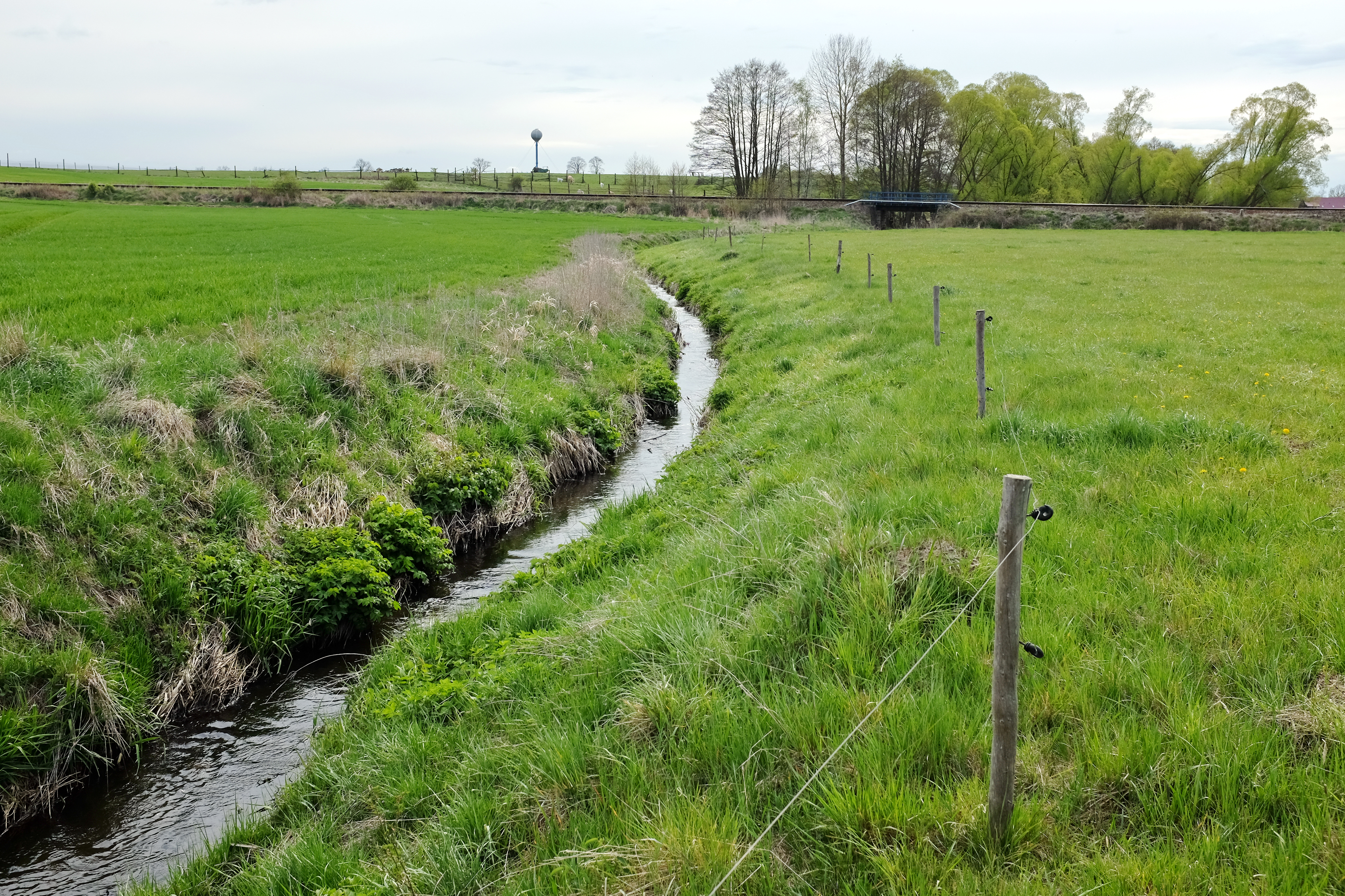 Vonšovský potok, přítok Stodolského potoka, okres Cheb